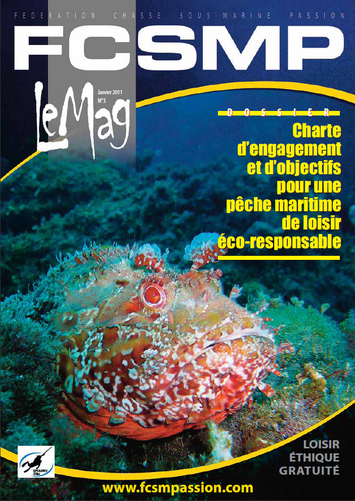 Couverture du magazine gratuit de la Fédération de chasse sous-marine Passion (FCSMP)